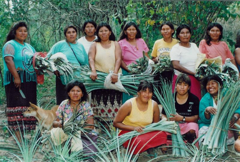 Indigenas Ayoreos